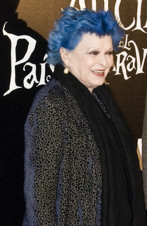 Carmen Lomana - Olfo - Lucía Bosé [?]